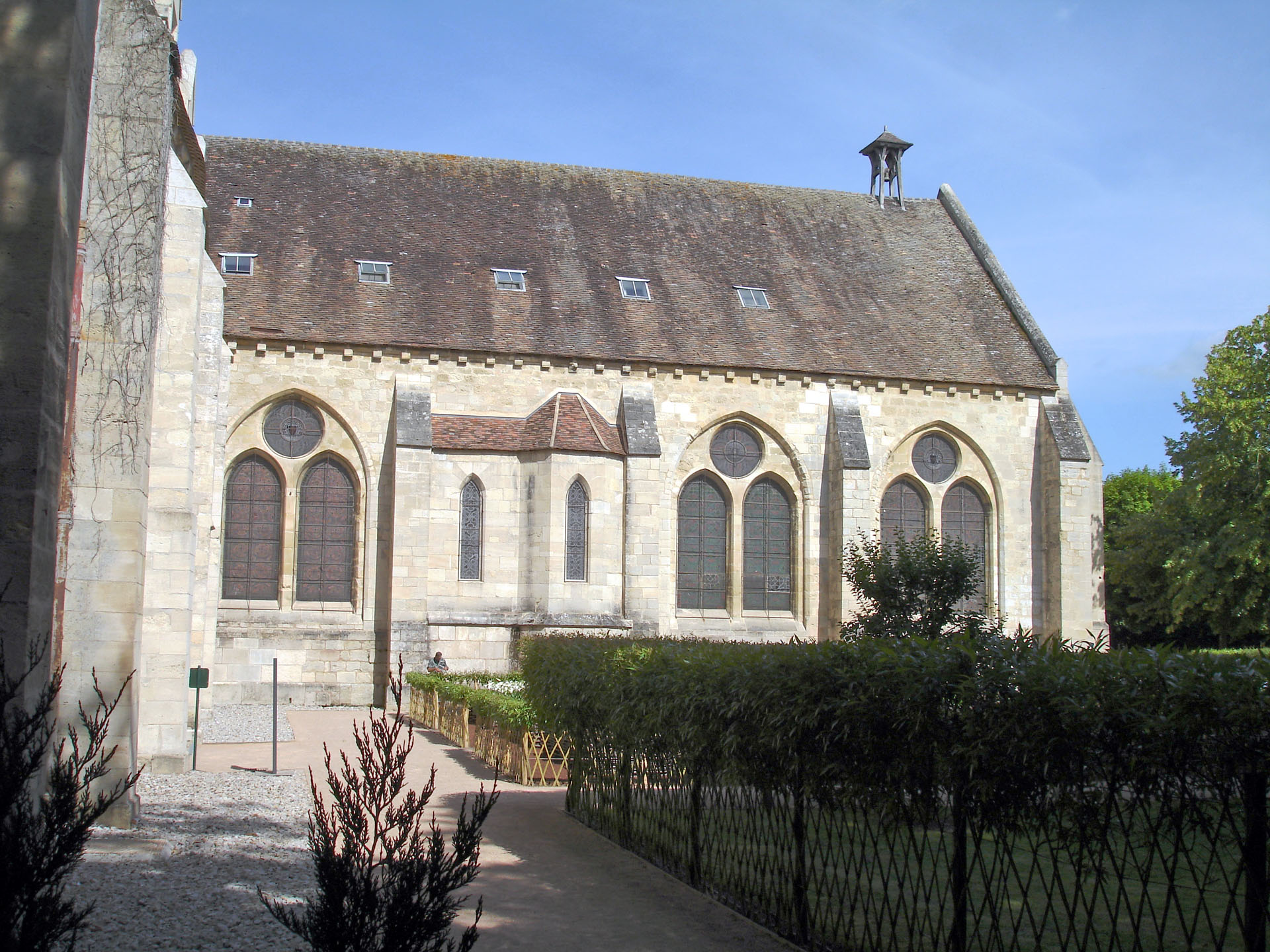 Façade ouest du réfectoire des moines de l'abbaye de Royaumont, Val-d'Oise, France.